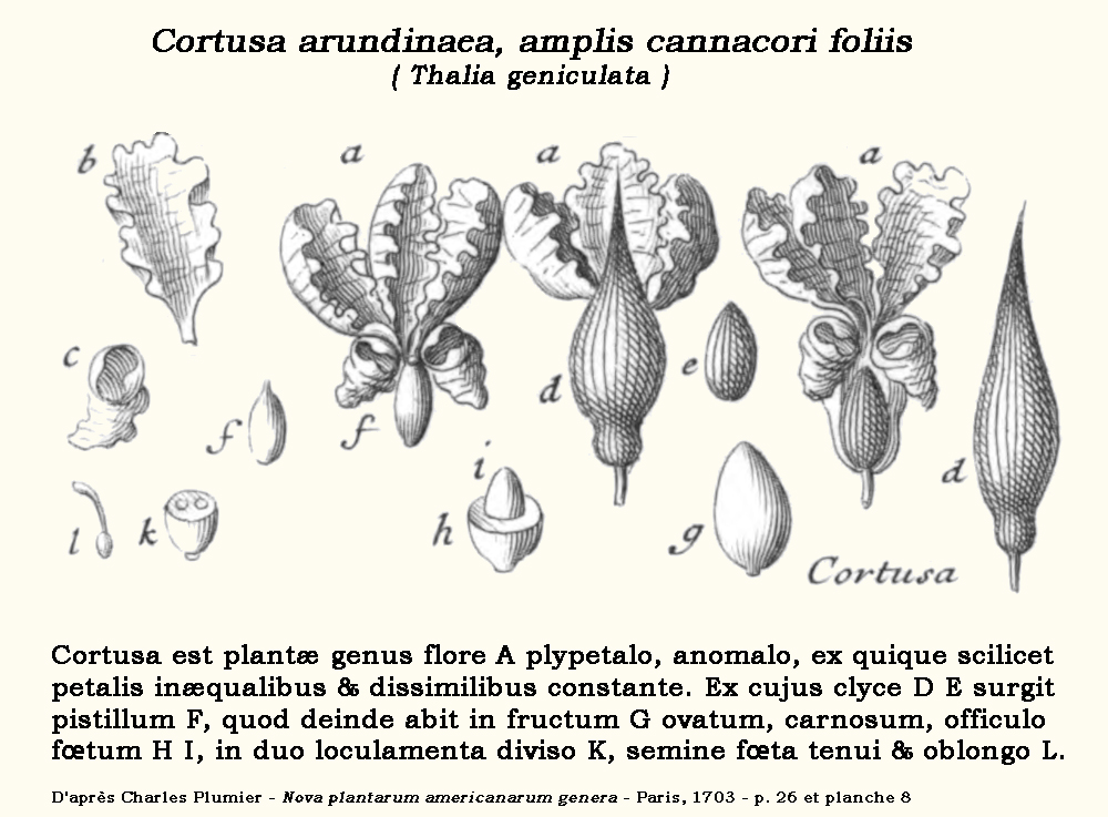 Thalia geniculata : Dessin et texte de Charles Plumier Planche 8 et page 26 de Nova plantarum americanarum genera - Paris, 1703 - Repris par D. Prévôt